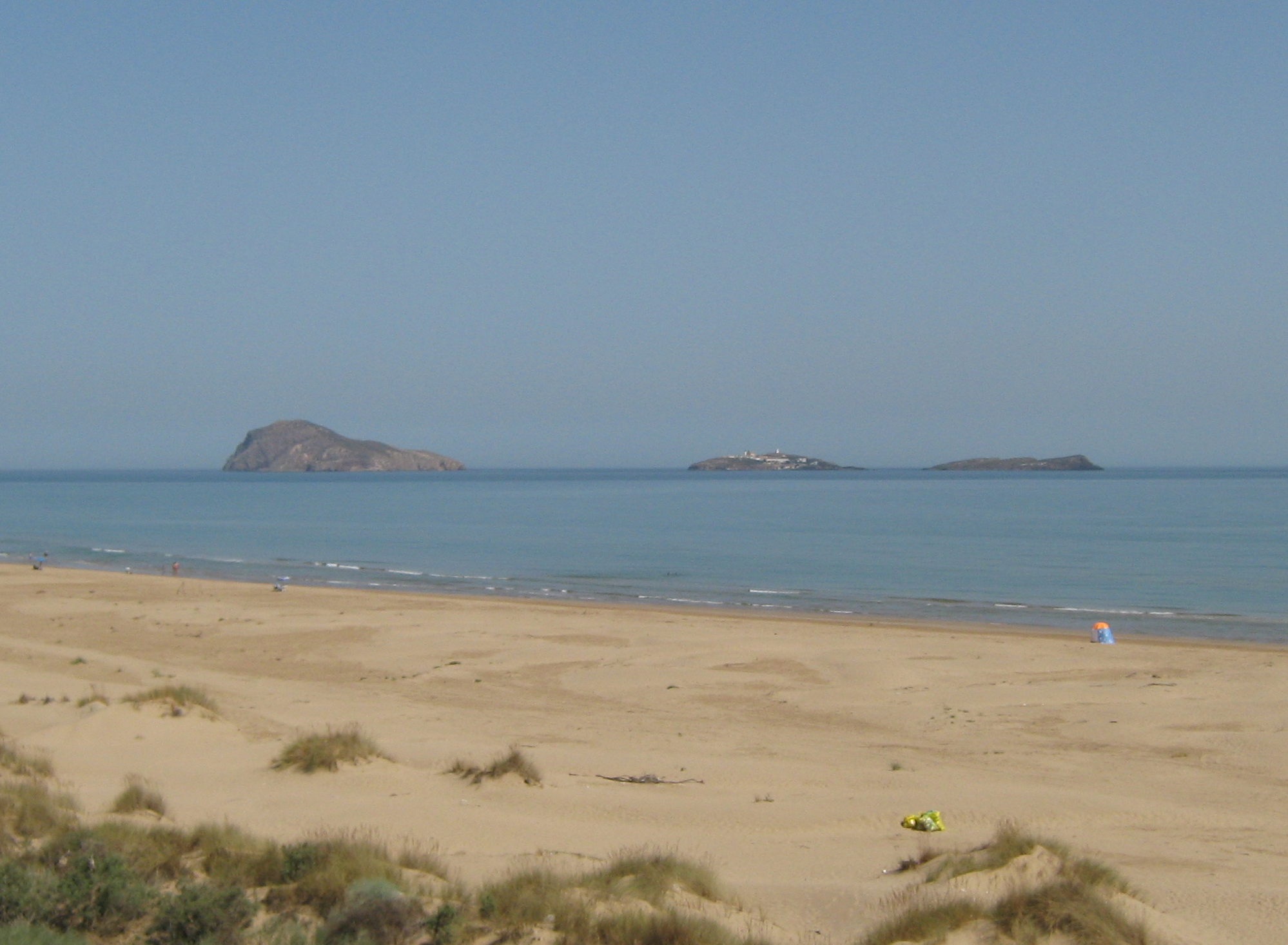 Vista de las islas Chafarinas desde el cabo de Agua (Marruecos)